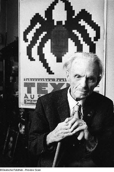 Willy Petzold, Fotografie aufgenommen 1975.